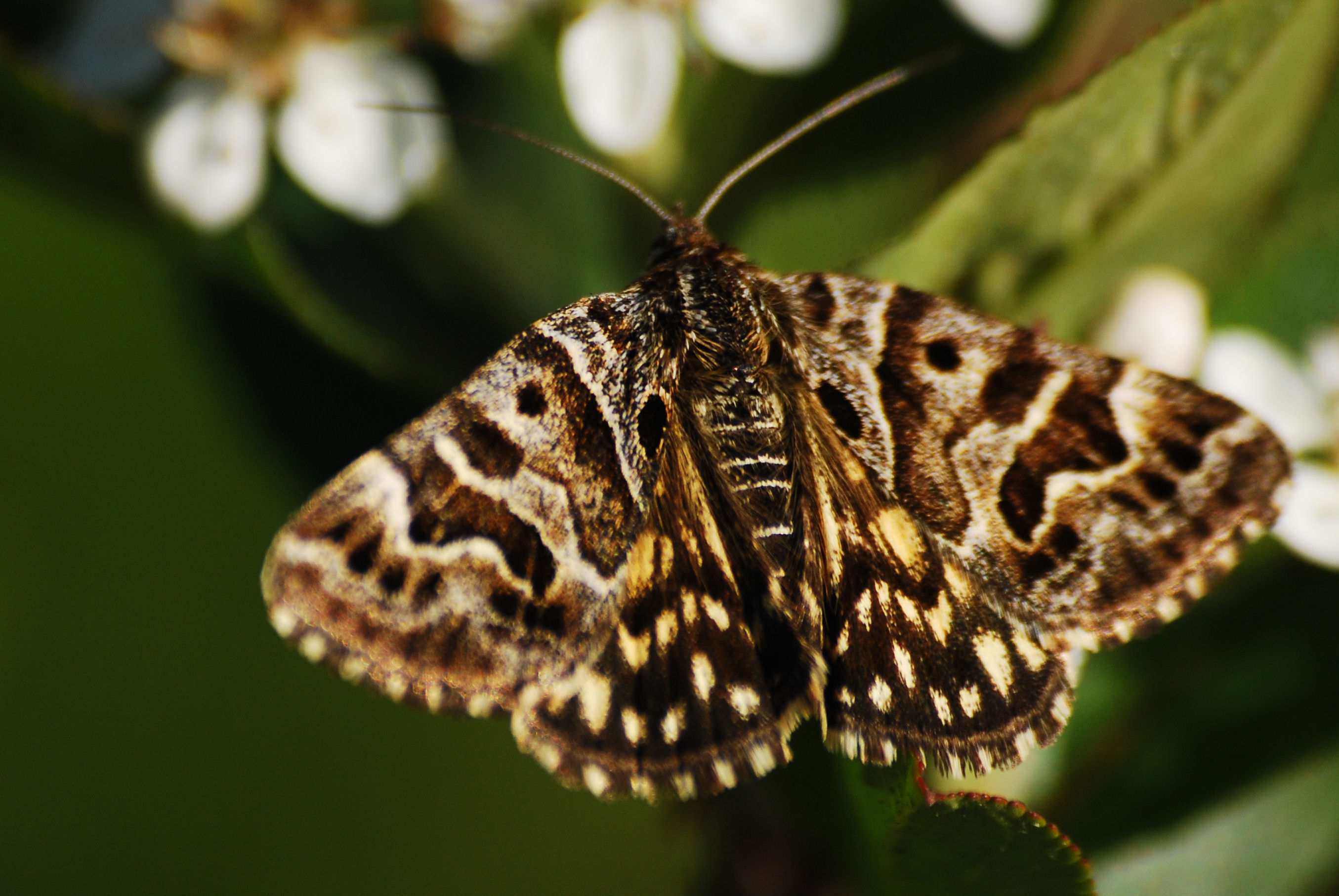 Callistege mi pl: Wygłoba szczawiówka